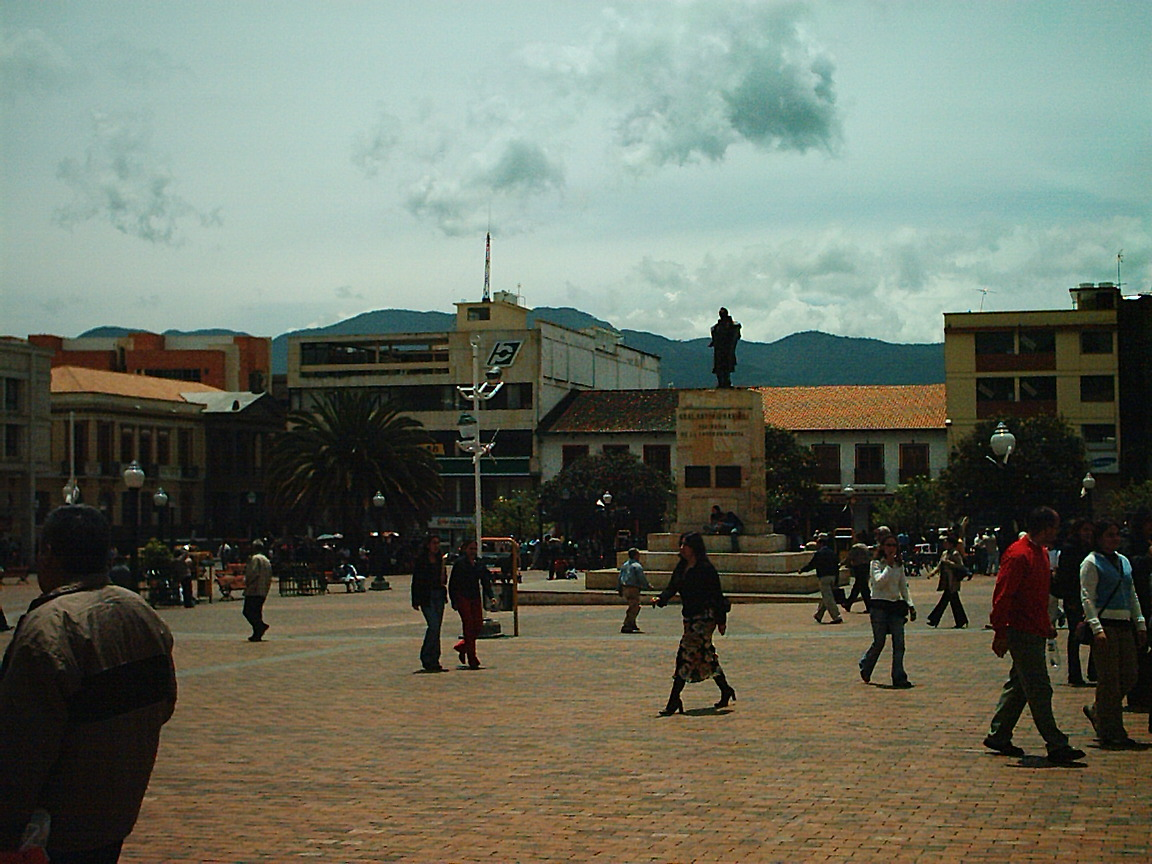 Esta foto corresponde a la plaza de Nariño de San juan de Pasto